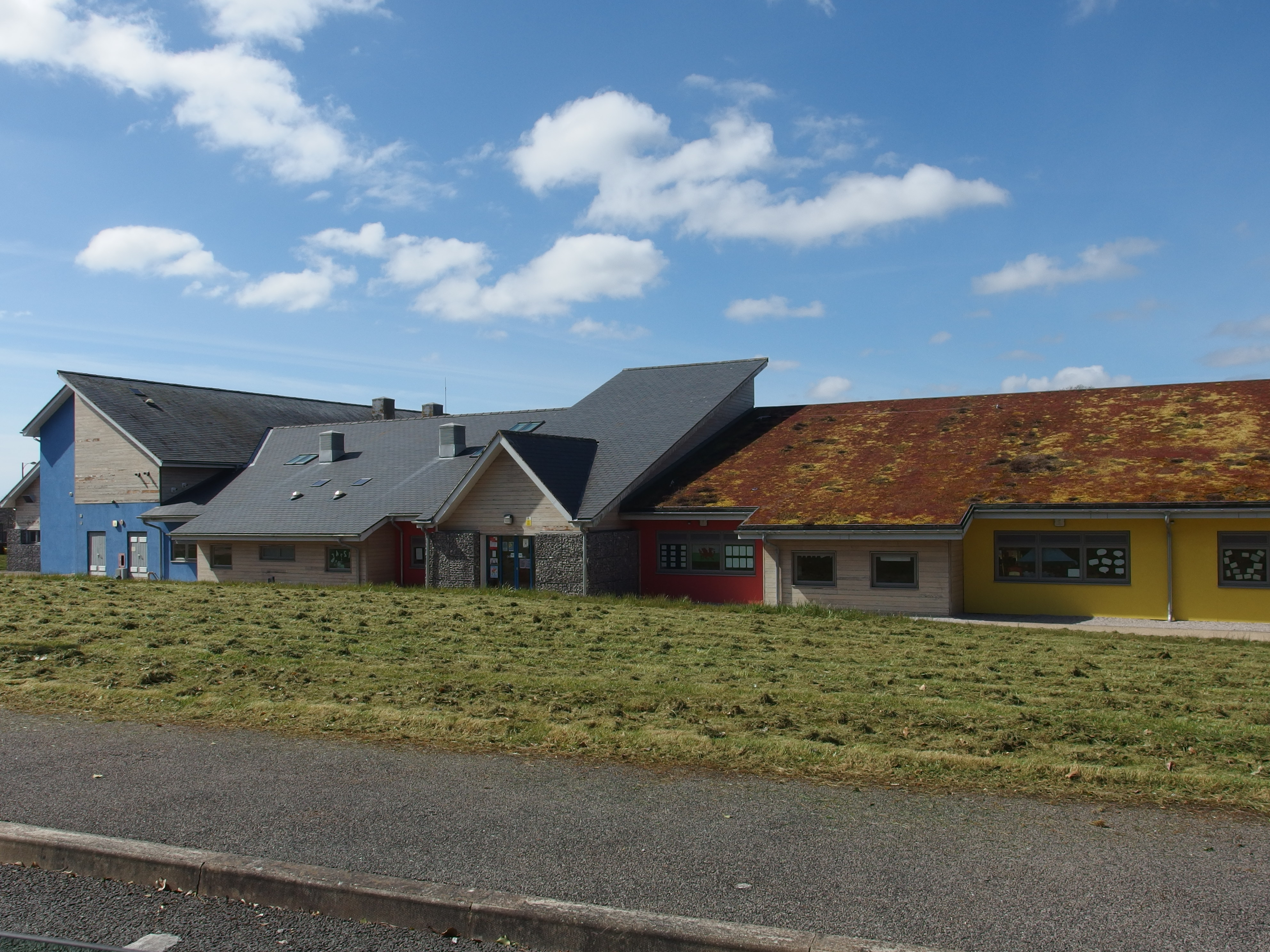 Llun o Ysgol y Graig